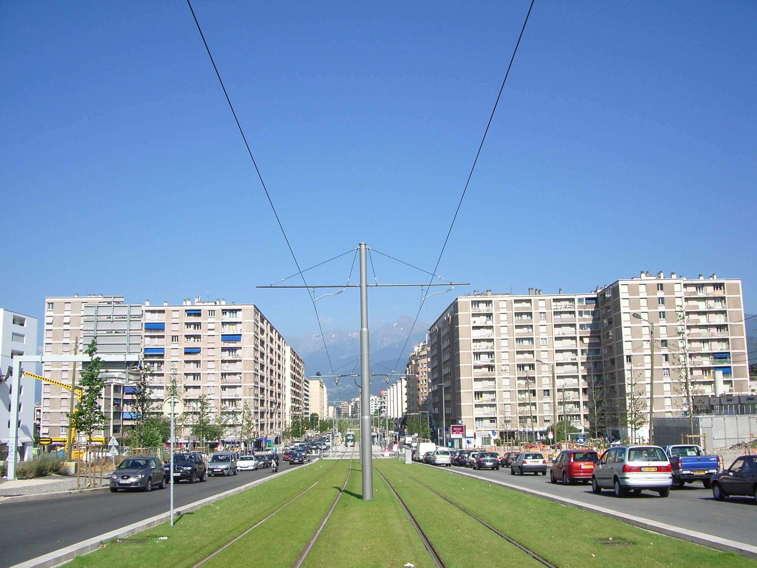 Grands boulevards de Grenoble, boulevard Joseph Vallier depuis le pont de Catane, vue vers l'Est